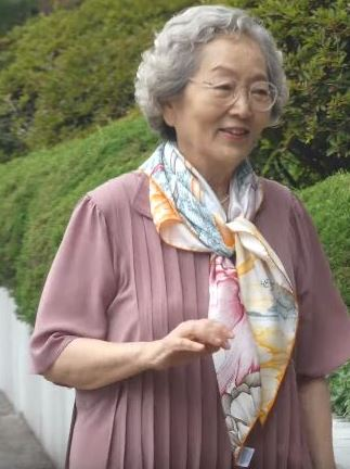 7월 13일 오후 서울시 영등포구 여의도 KBS 별관에서 '해피투게더4' 녹화가 진행됐다. 이날 녹화는 '디어 마이 프렌즈 특집'으로 김영옥X나문희X박원숙X고두심과 MC 유재석, 전현무, 조세호, 조윤희가 출연한다.